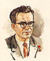 Ganzzsache der Post der Sowjetunion aus Anlass des 1. Todestages von Wiktor Michailowitsch Gluschkow